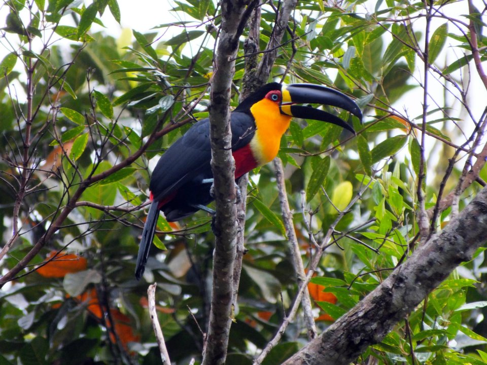 Espécie endêmica da Mata Atlântica